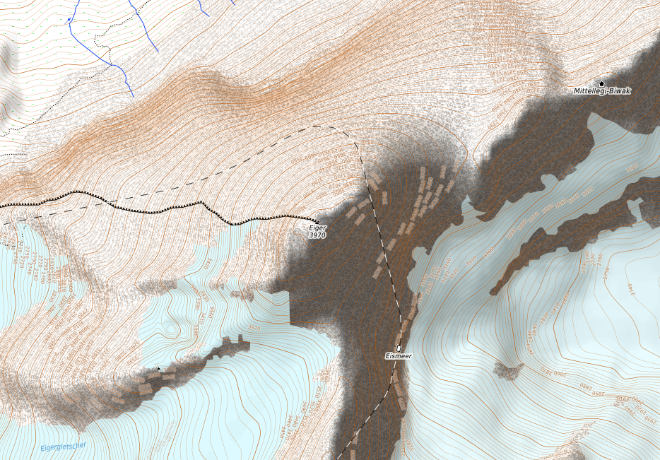 carte réalisée sur umap This map may be incomplete, and may contain errors. Don't rely solely on it for navigation.